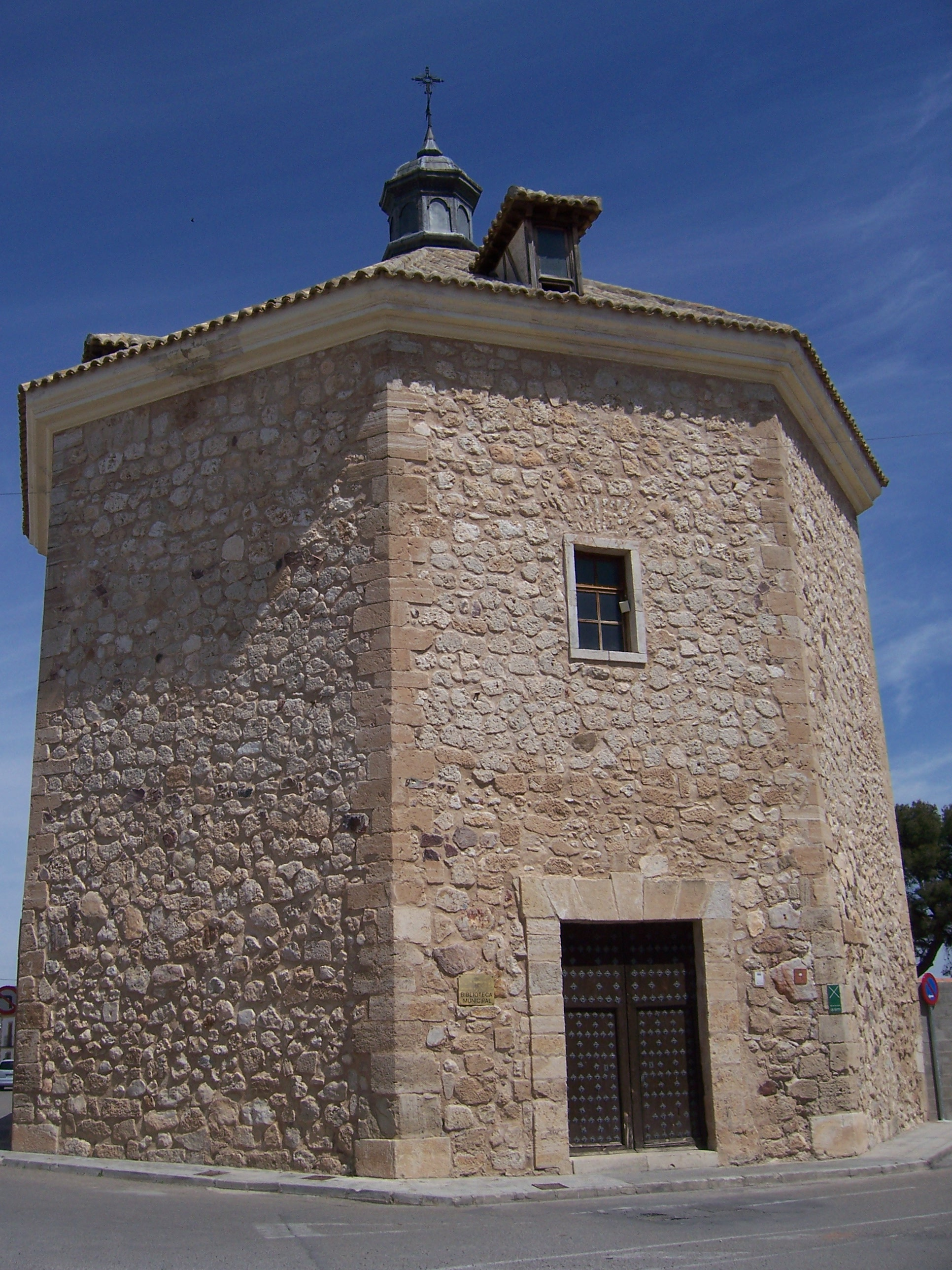 Ermita de La Vera Cruz. Tembleque